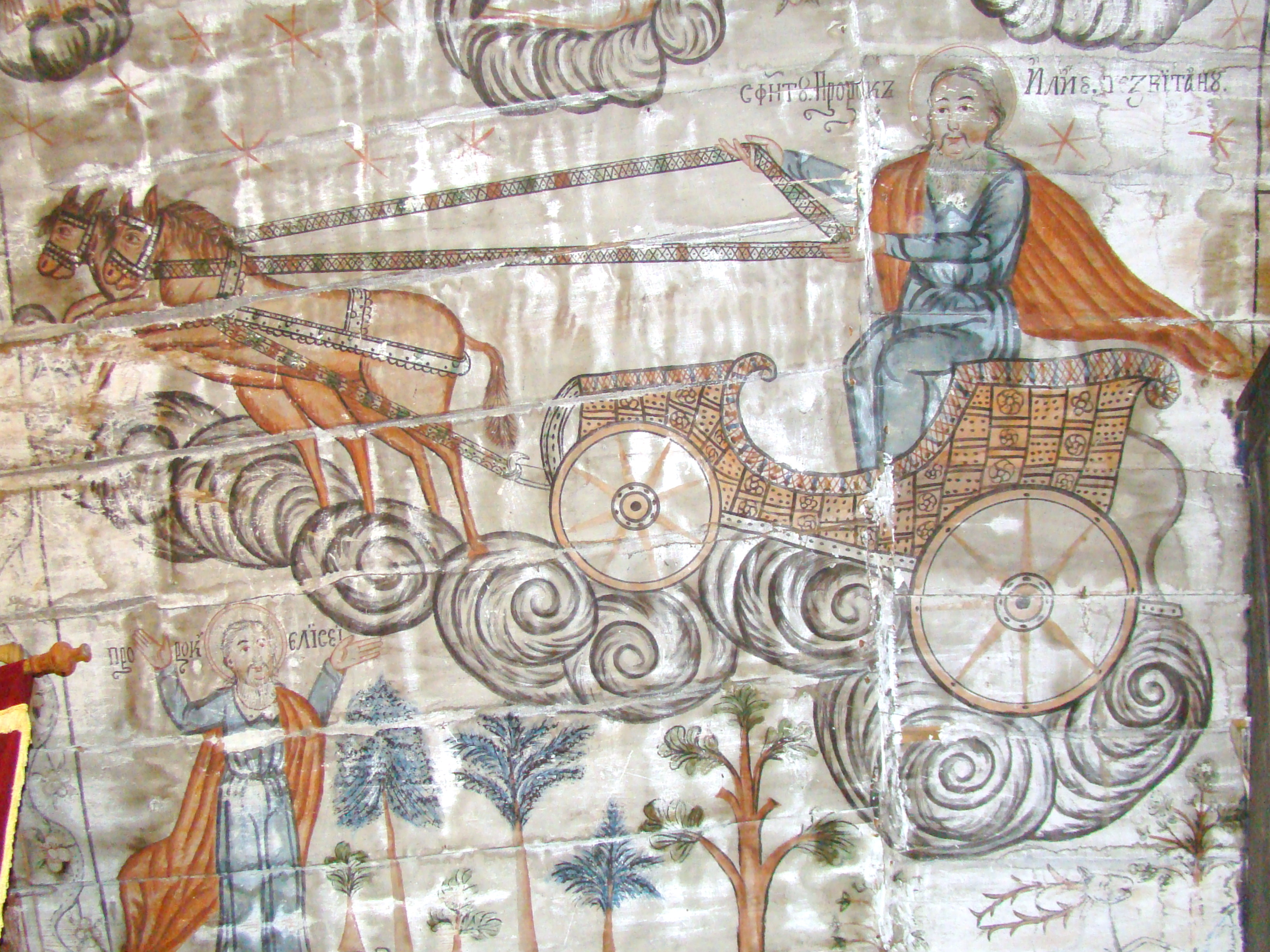 Sfântul prooroc Ilie Tesviteanul. Biserica de lemn din Purcăreț, comuna Letca, județul Sălaj